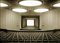 Fra kinosalen på Saga kino i Oslo, 1934